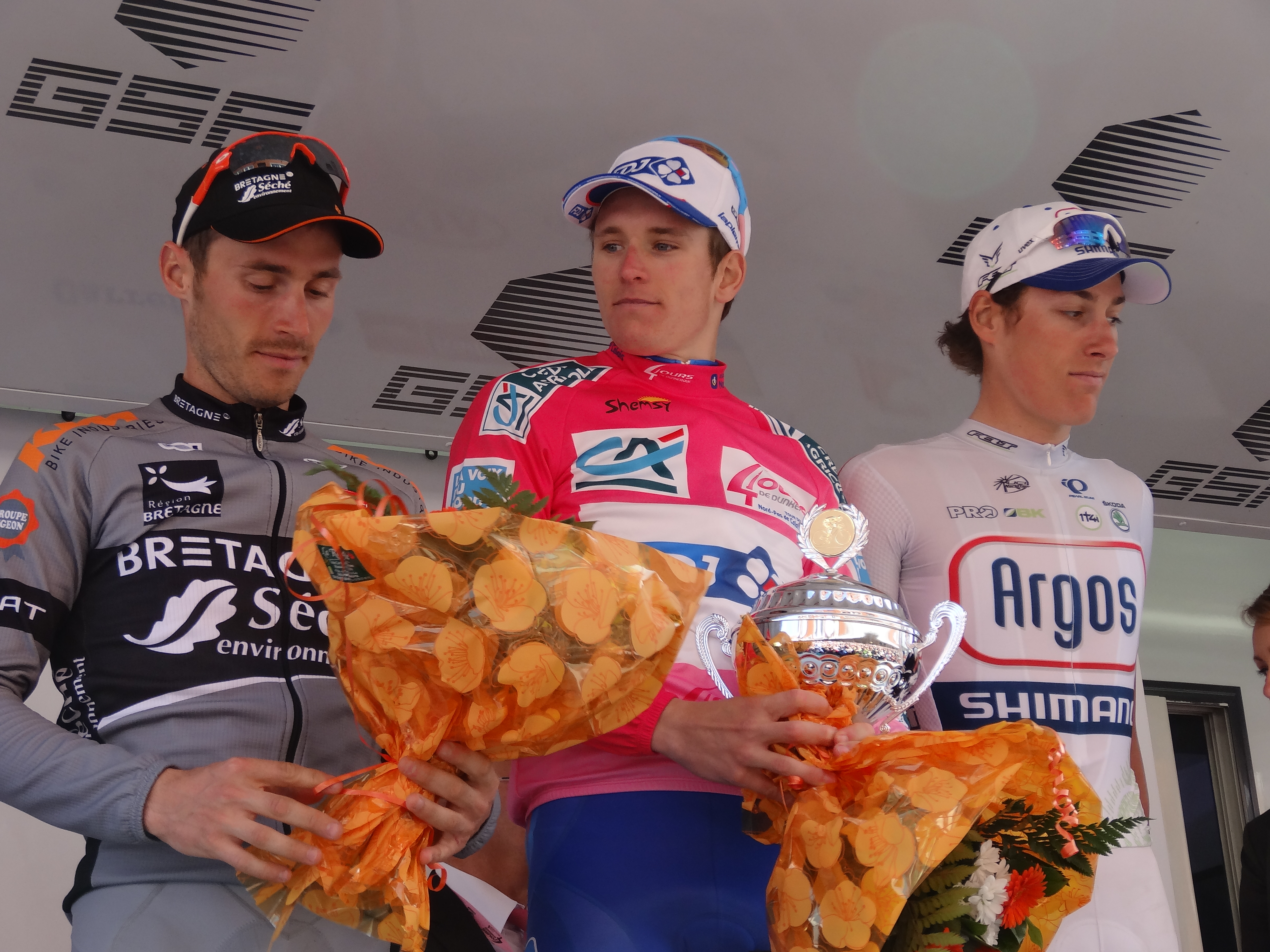 Reportage photographique réalisé le dimanche 5 mai 2013 à l'arrivée de la cinquième et dernière étape de l'édition 2013 des Quatre jours de Dunkerque à Dunkerque, Nord, Nord-Pas-de-Calais, France. Depicted people: Florian Vachon, Arnaud Démare and Ramon Sinkeldam